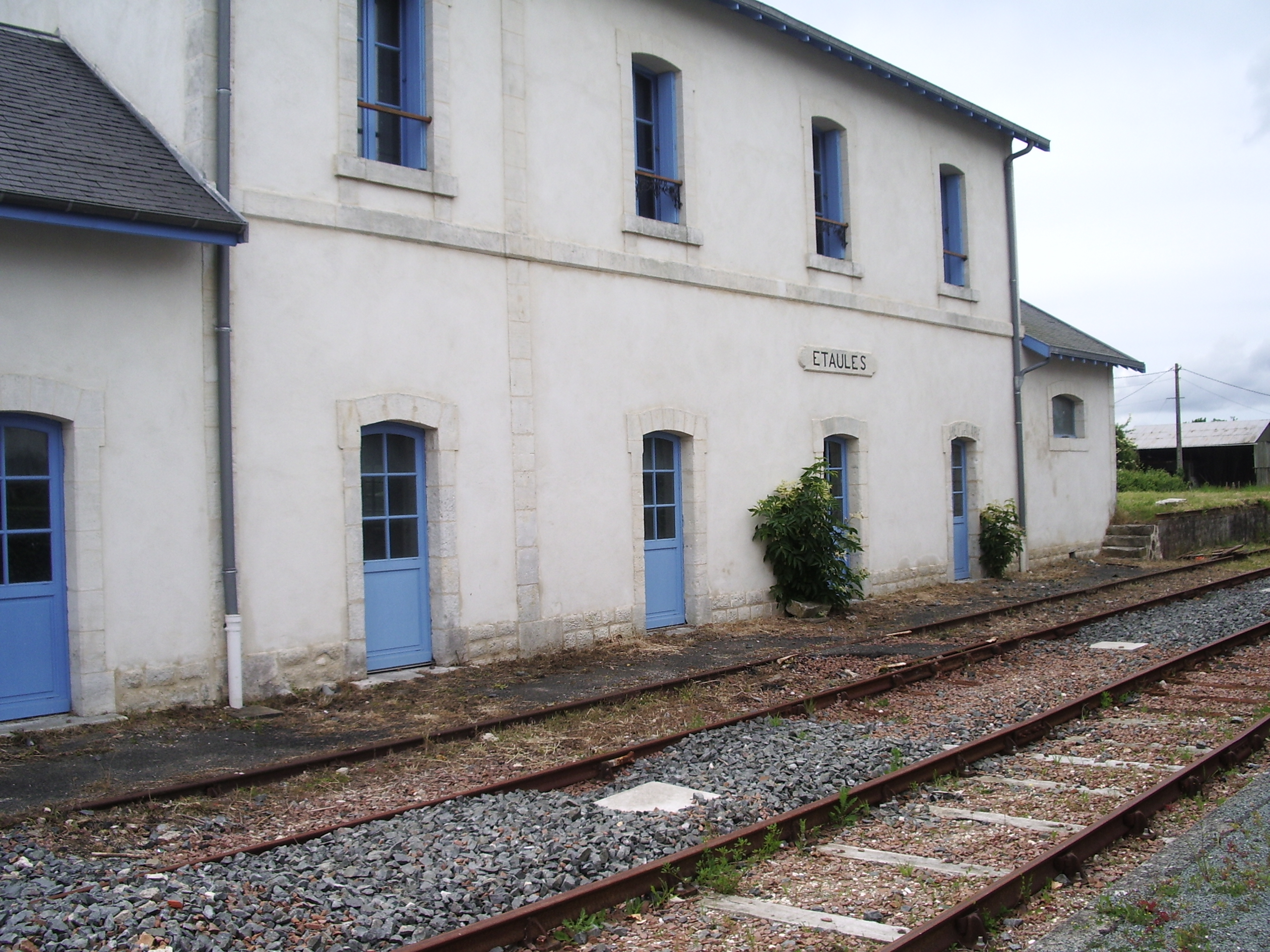 Quais de la gare d'Etaules, Charente-Maritime, France (train touristique de la Seudre)